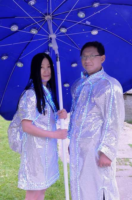 Insook Ju & Sukyun Yang. Kunstaktion Kultursommer Paderborn 2010